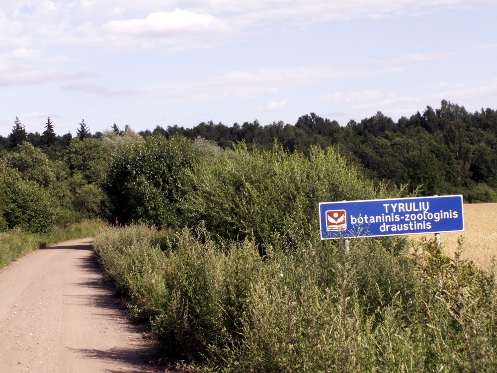 Tyrulių botaninis zoologinis draustinis